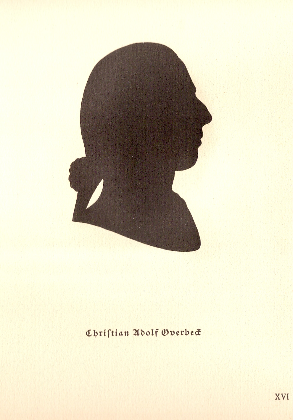 Silhouette (Schattenriss) den Dichter Christian Adolph Overbeck zeigend